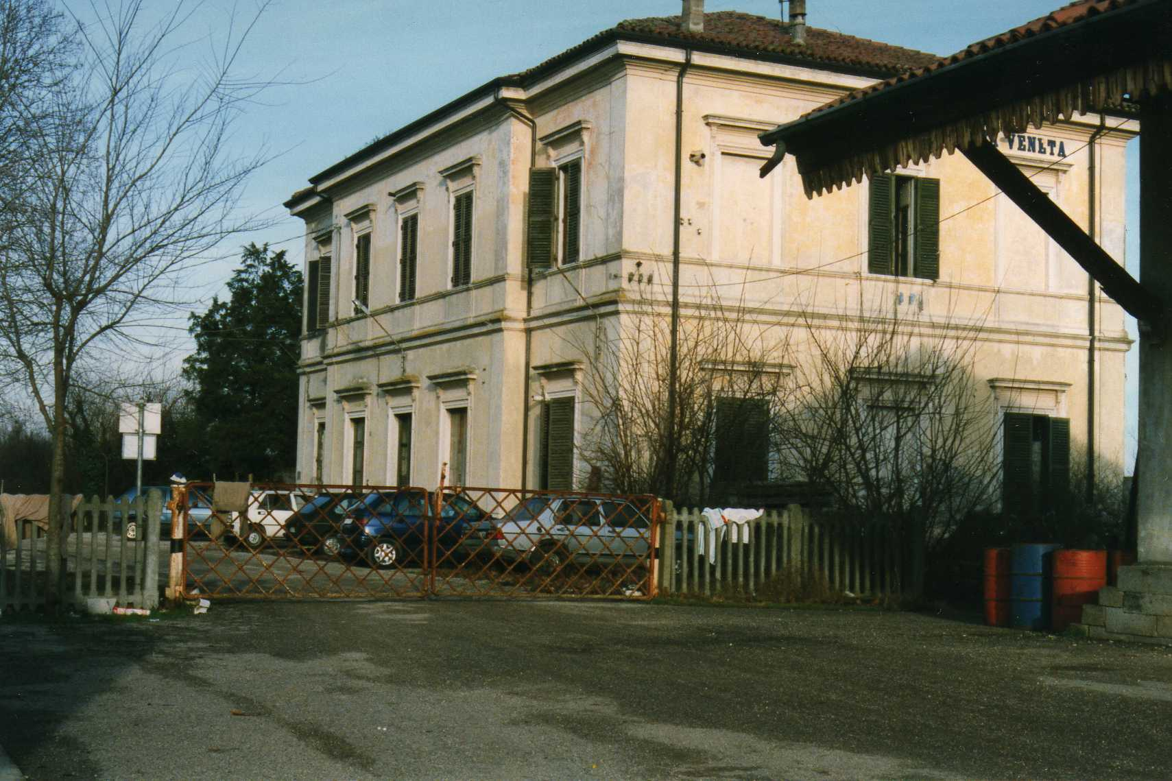 Autore: il sottoscritto, Mirko Rizzotto; foto scattata dal sottoscritto; Stazione di Cologna Veneta, piazzale esterno; pubblico dominio, rilascio tutti i diritti, sono l'autore.